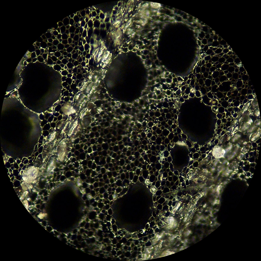 FR:Description Photographie au microscope d'un charbon de bois pour une étude anthracologique Photographe: Henri-Georges NATON Source: importé par le photographe Licence: GFDL-self